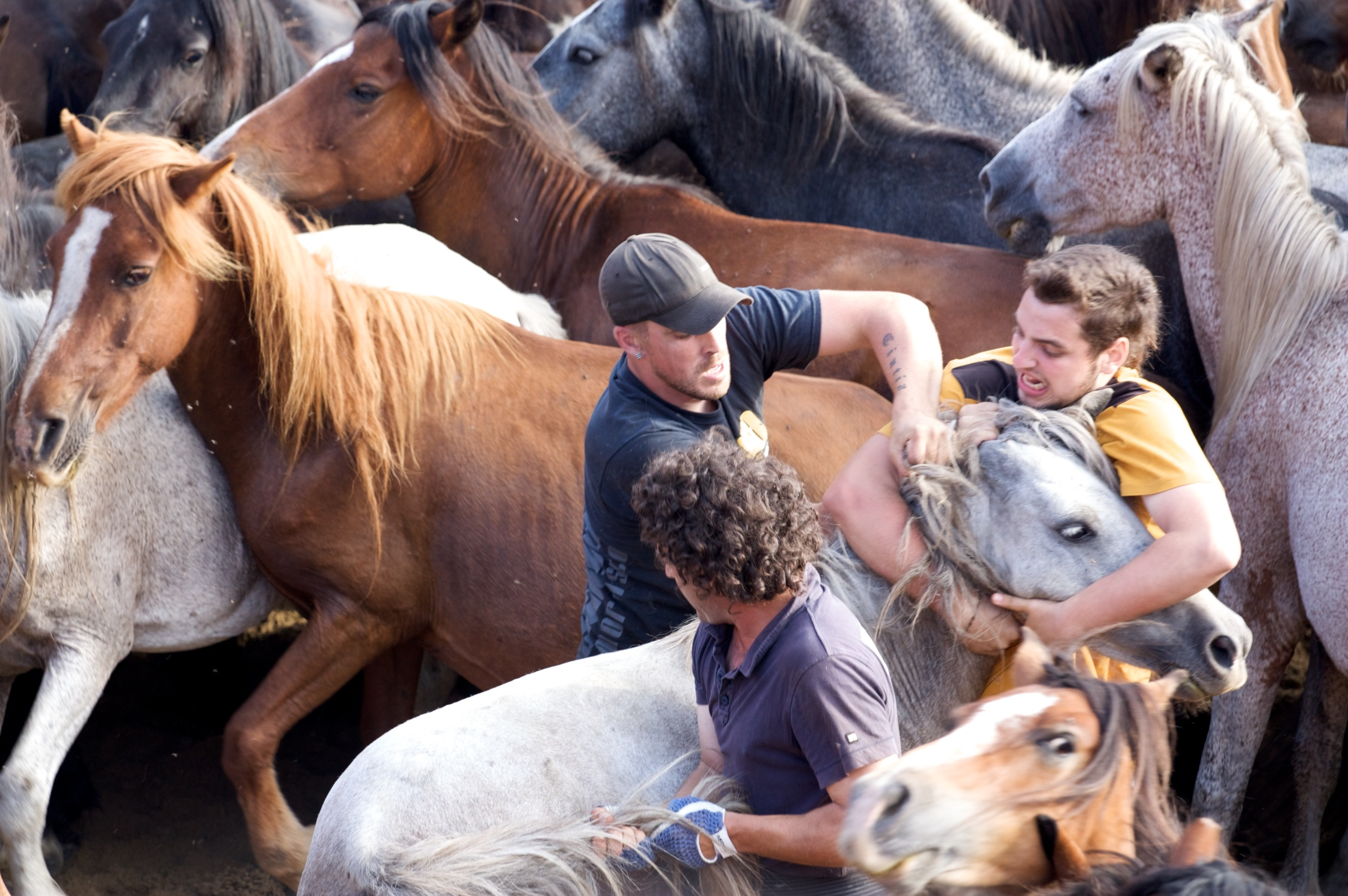 Rapa Das Bestas en el "Curro" de Sabucedo, Pontevedra, Galicia. Rapa Das Bestas en el "Curro" de Sabucedo, Bestas y A'loitadores, ofrecieron grandes momentos. Pontevedra, Galicia.